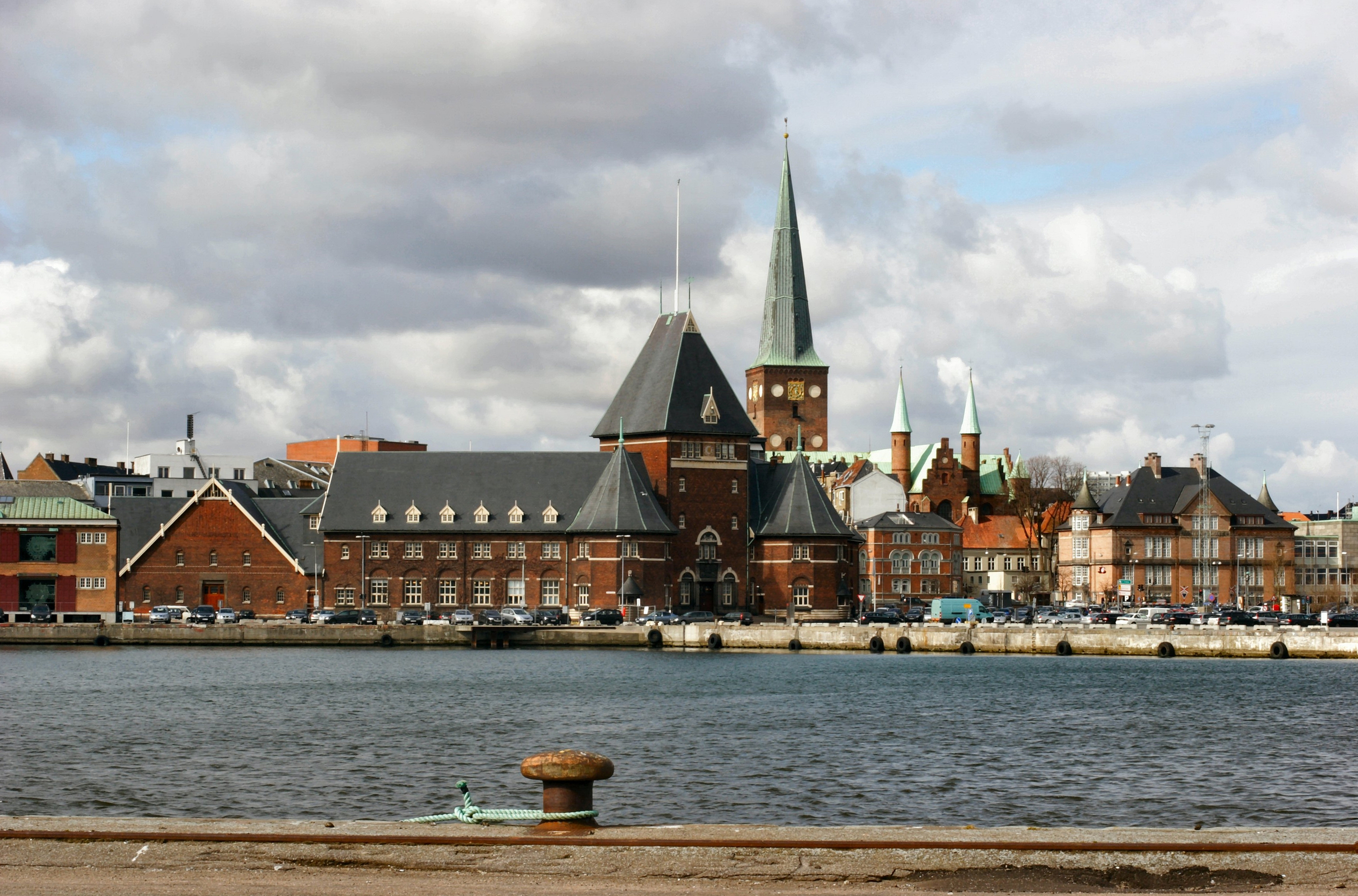 Toldboden, Aarhus Domkirke og Katedralskolen set fra "Dokken", Aarhus, Danmark